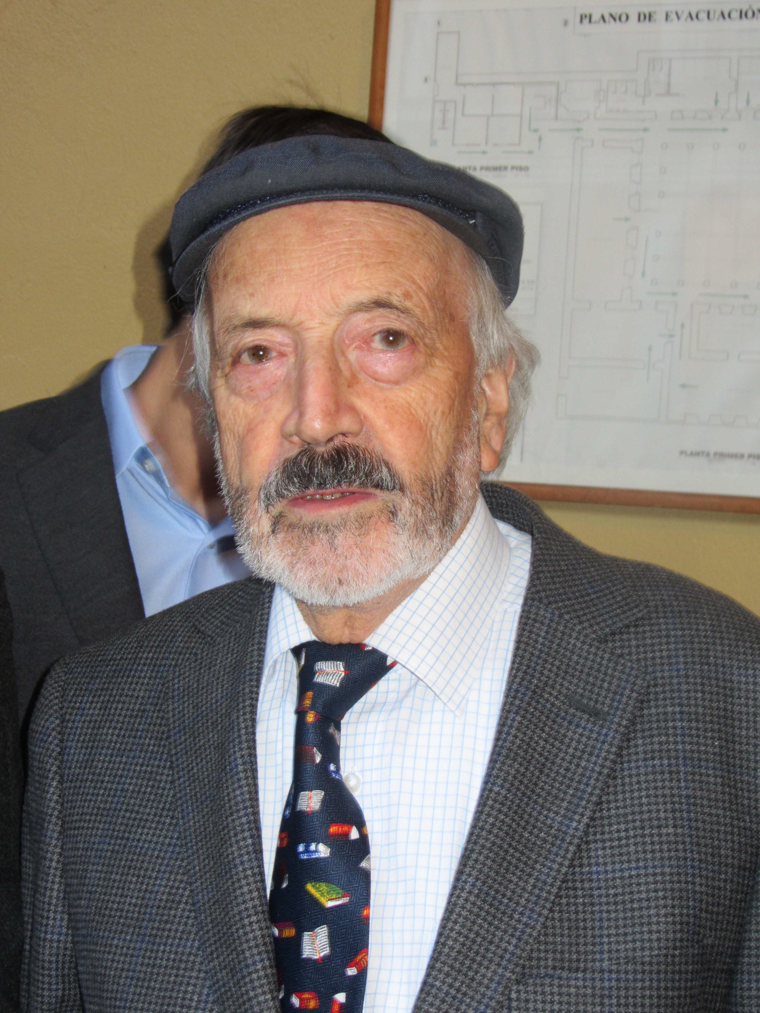 El poeta chileno Floridor Pérez, Fiesta del Libro en la Plaza de Armas de Santiago, abril, 2013